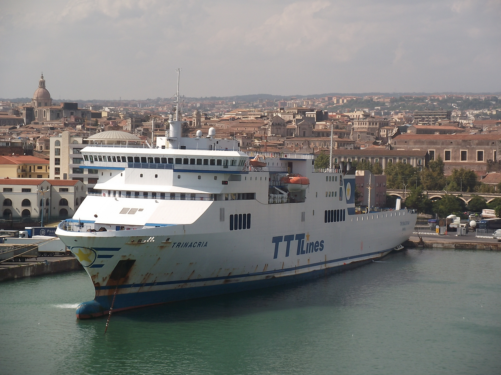 MS Trinacria in Catania / Sizilien IMO Number: 9261542 MMSI Number: 247079100 Callsign: ICBB Length: 187 m Beam: 26 m